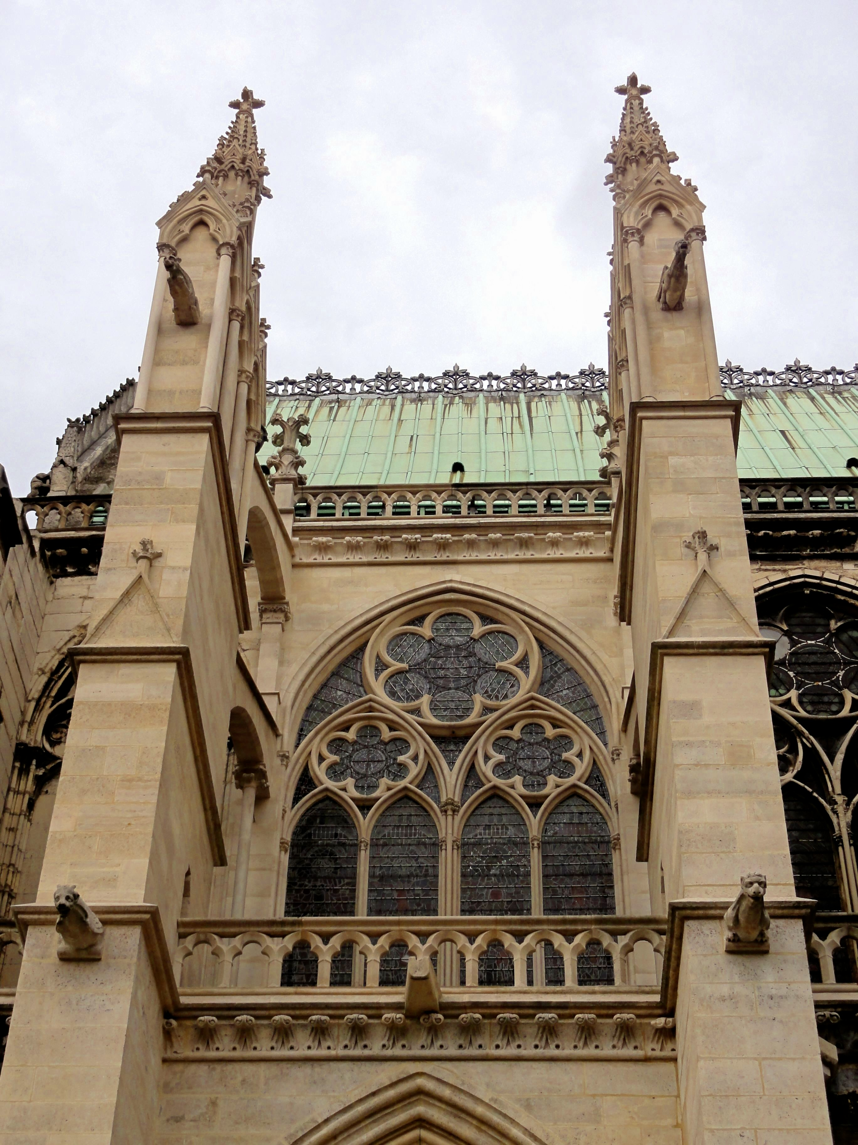 Fenêtre haute de la première travée complète de la nef, au sud.